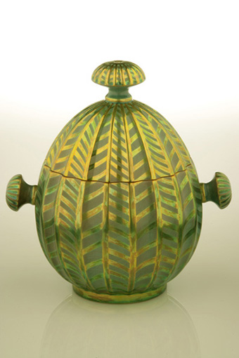 Fotó T. Surányi Anna kerámiájáról. Doboz a Fatime sorozatból. Készült 2002-ben eosinból. 23 x 22 cm-es.